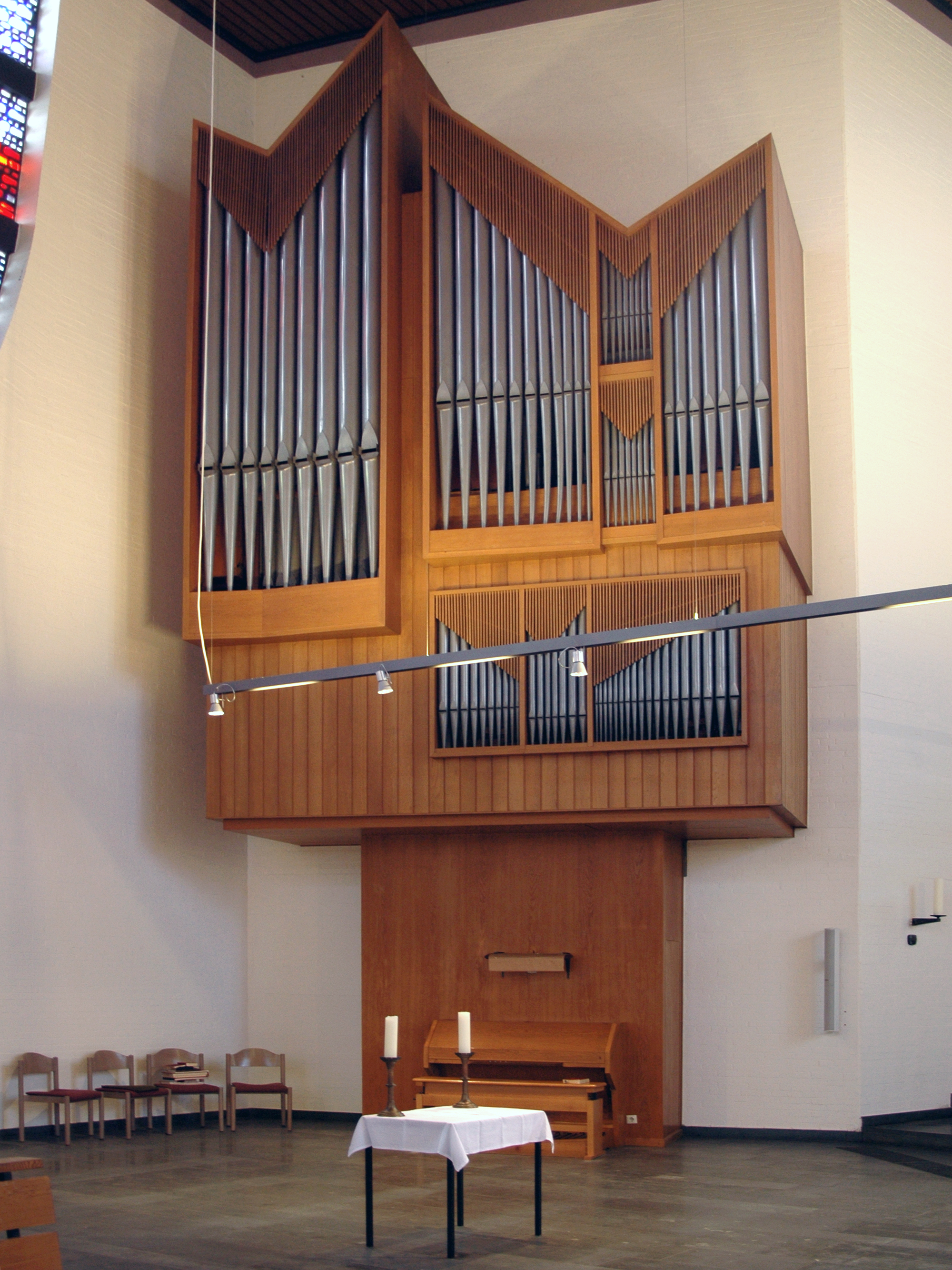 Kreienbrink Orgel der St. Thomas Morus Kirche in Gießen des Orgelbauers Matthias Kreienbrink, Osnabrück.